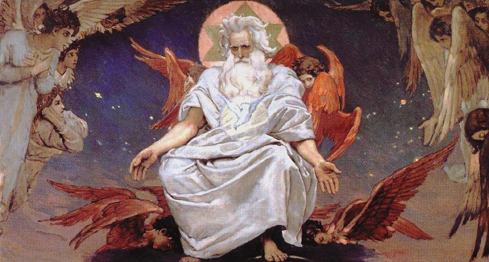 Бог Саваоф